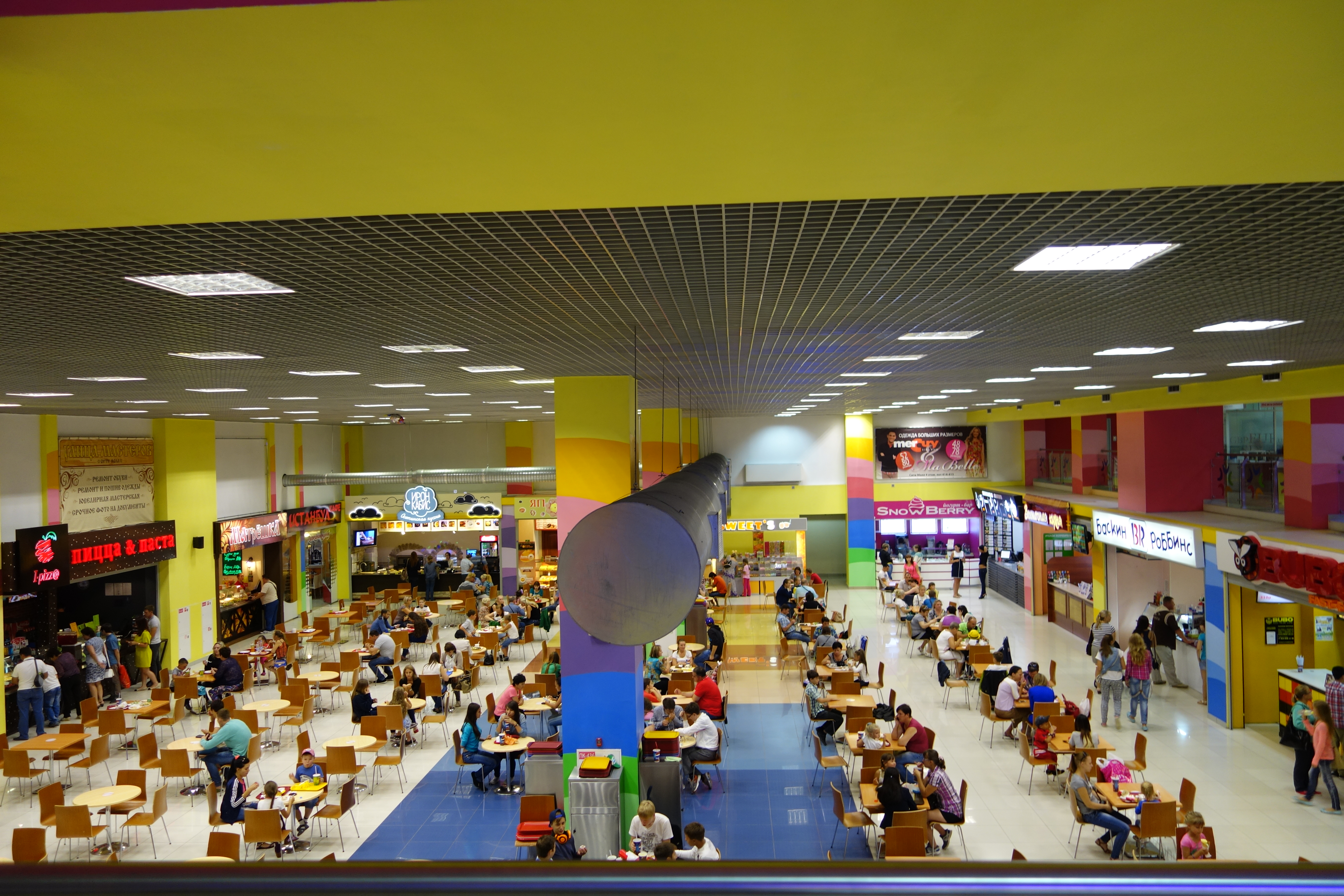 Сити-Молл. Южно-Сахалинск. Крупнейший торгово-развлекательный комплекс на Дальнем Востоке России. 2014 г.